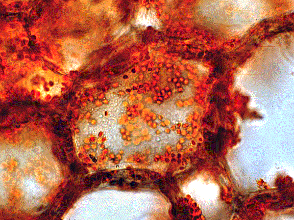 Хромопласты в клетках черного перца.